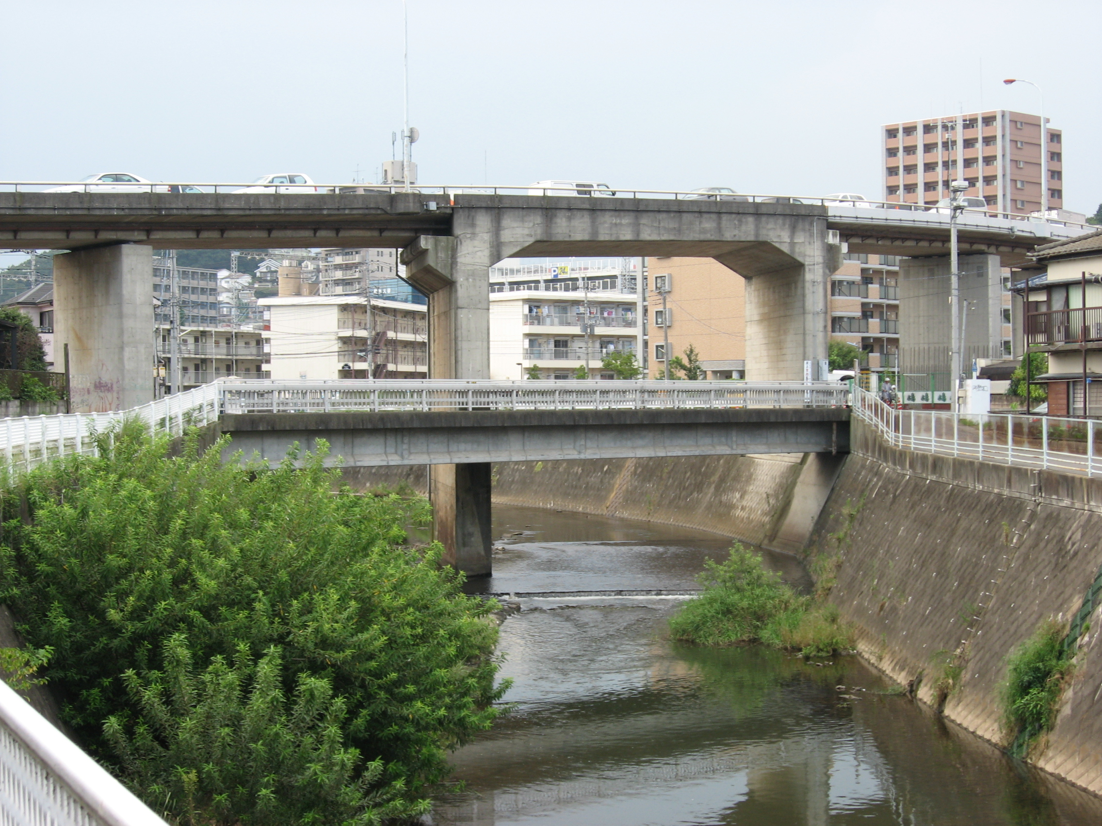 鶴見川 宝殿橋